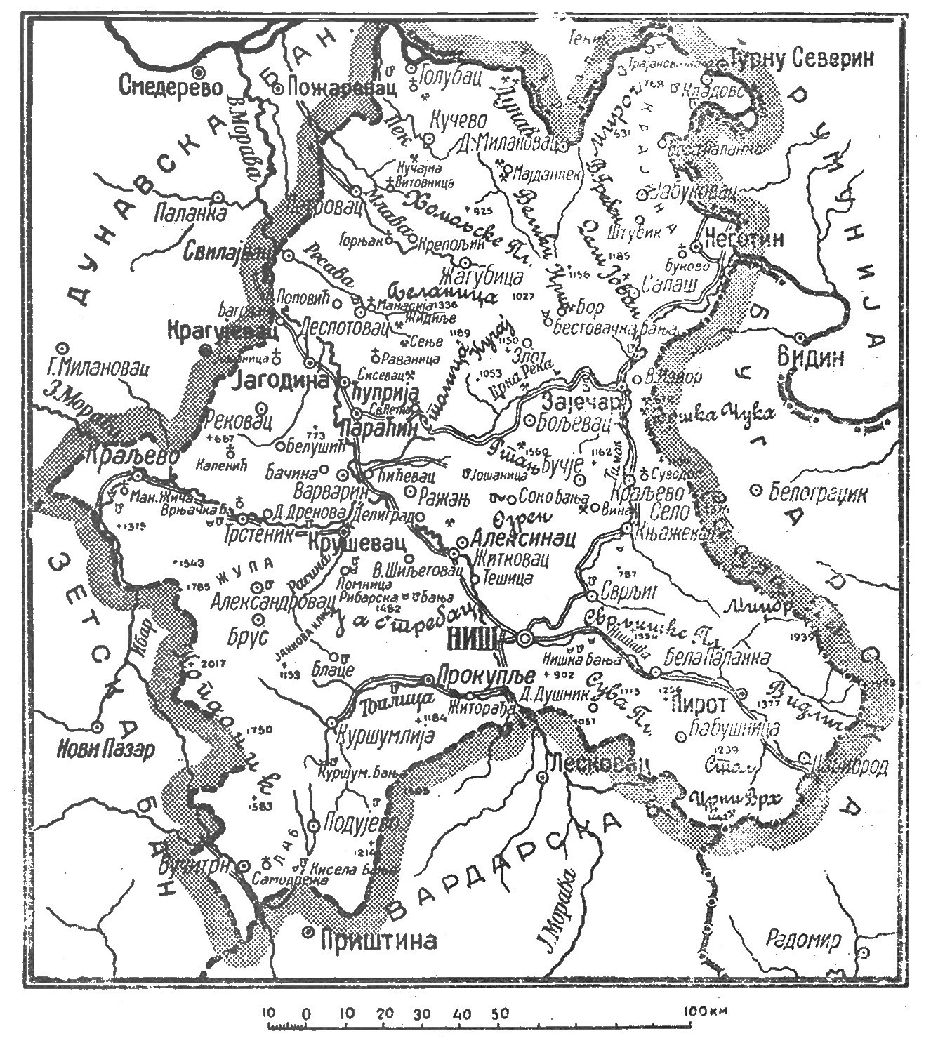 Карта Моравске бановине.